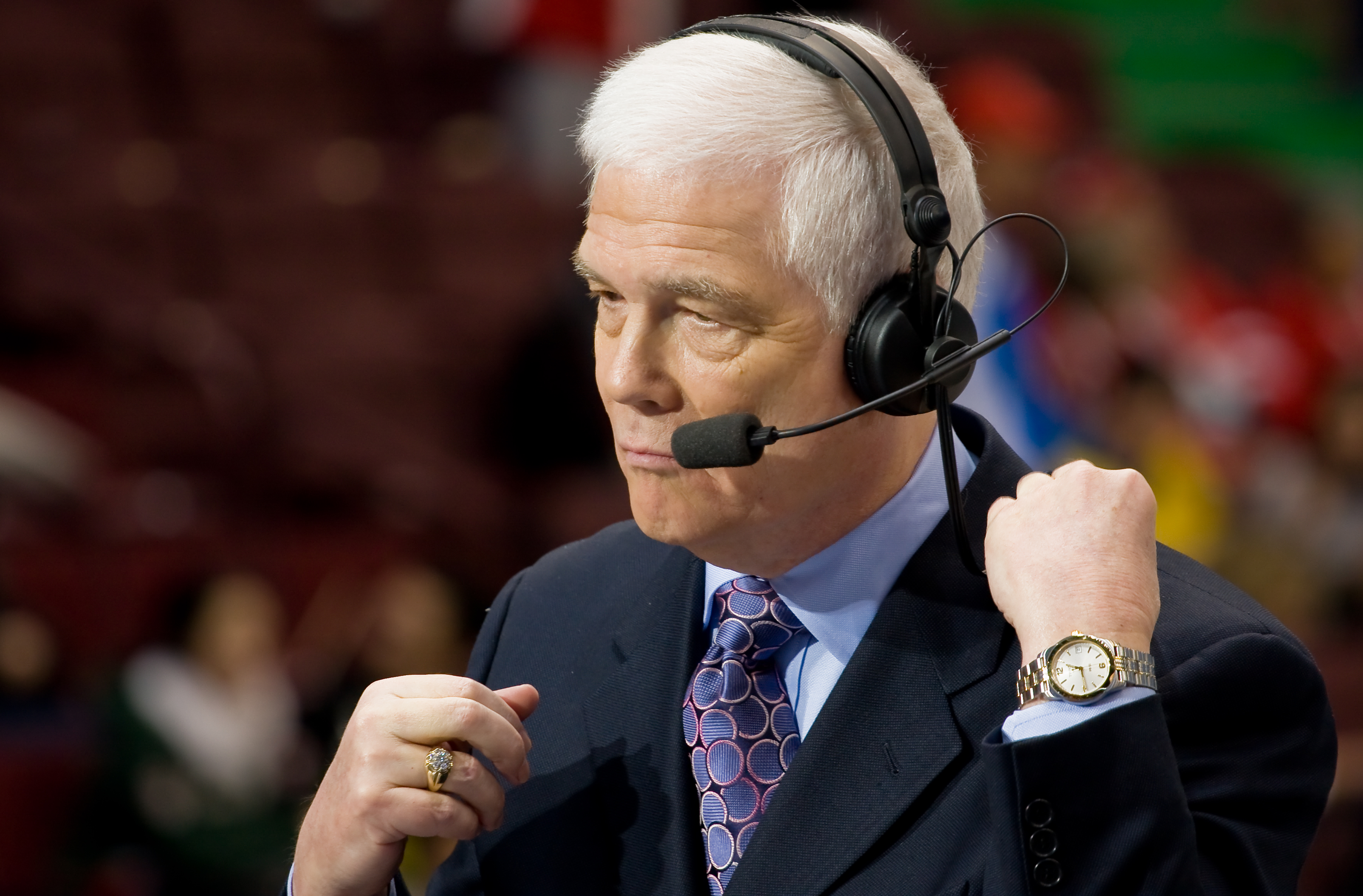 Sportscaster Dave Hodge